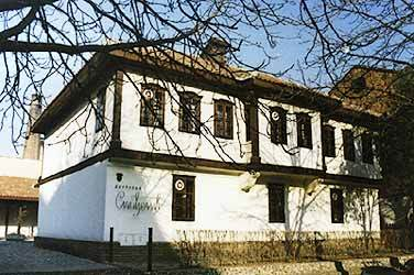 Kuca Stambolijska-Nis